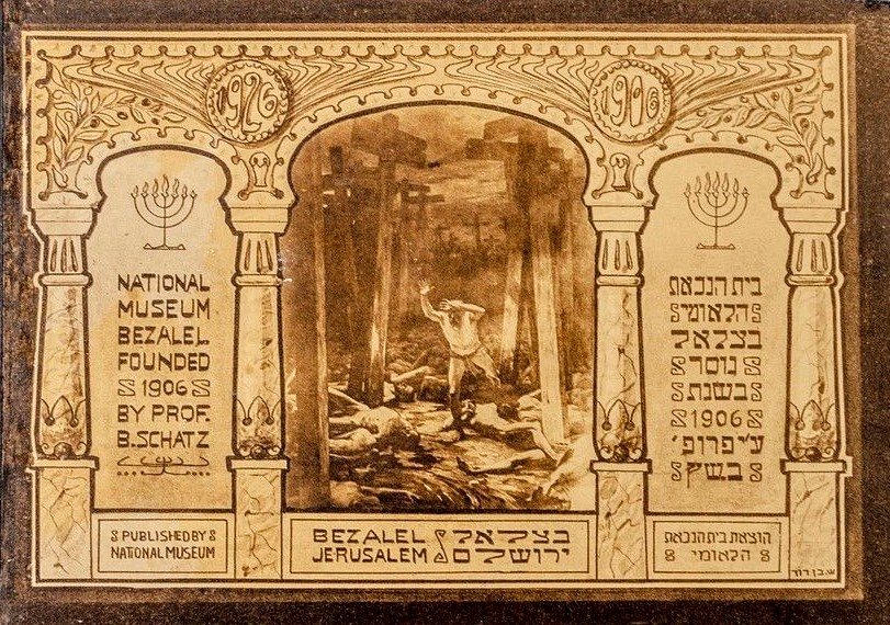 Postcards Portfolio